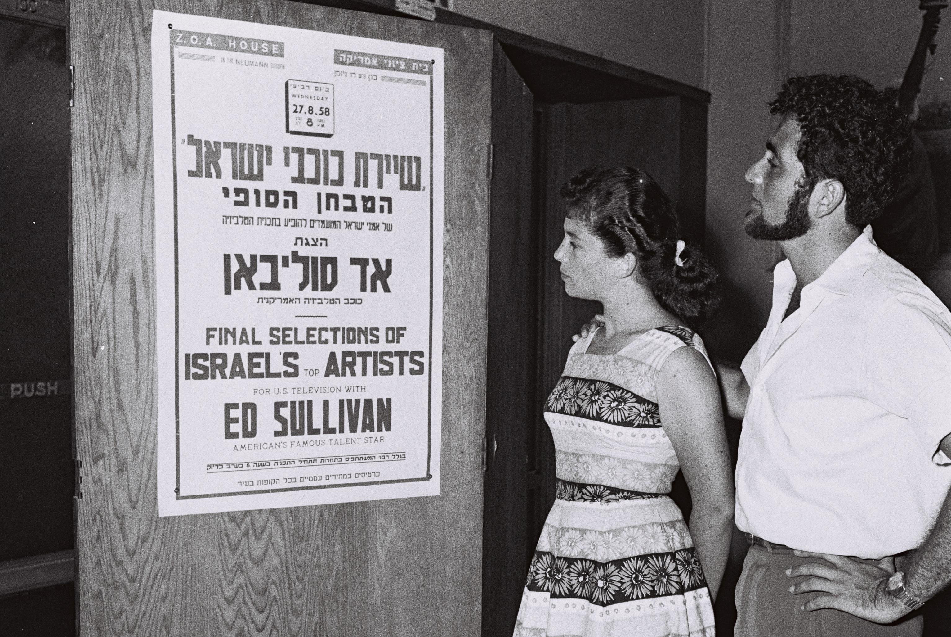 NEHAMA HENDEL AND MENAHEM ELIRAN LOOKING AT ED SULLIVAN'S POSTER.